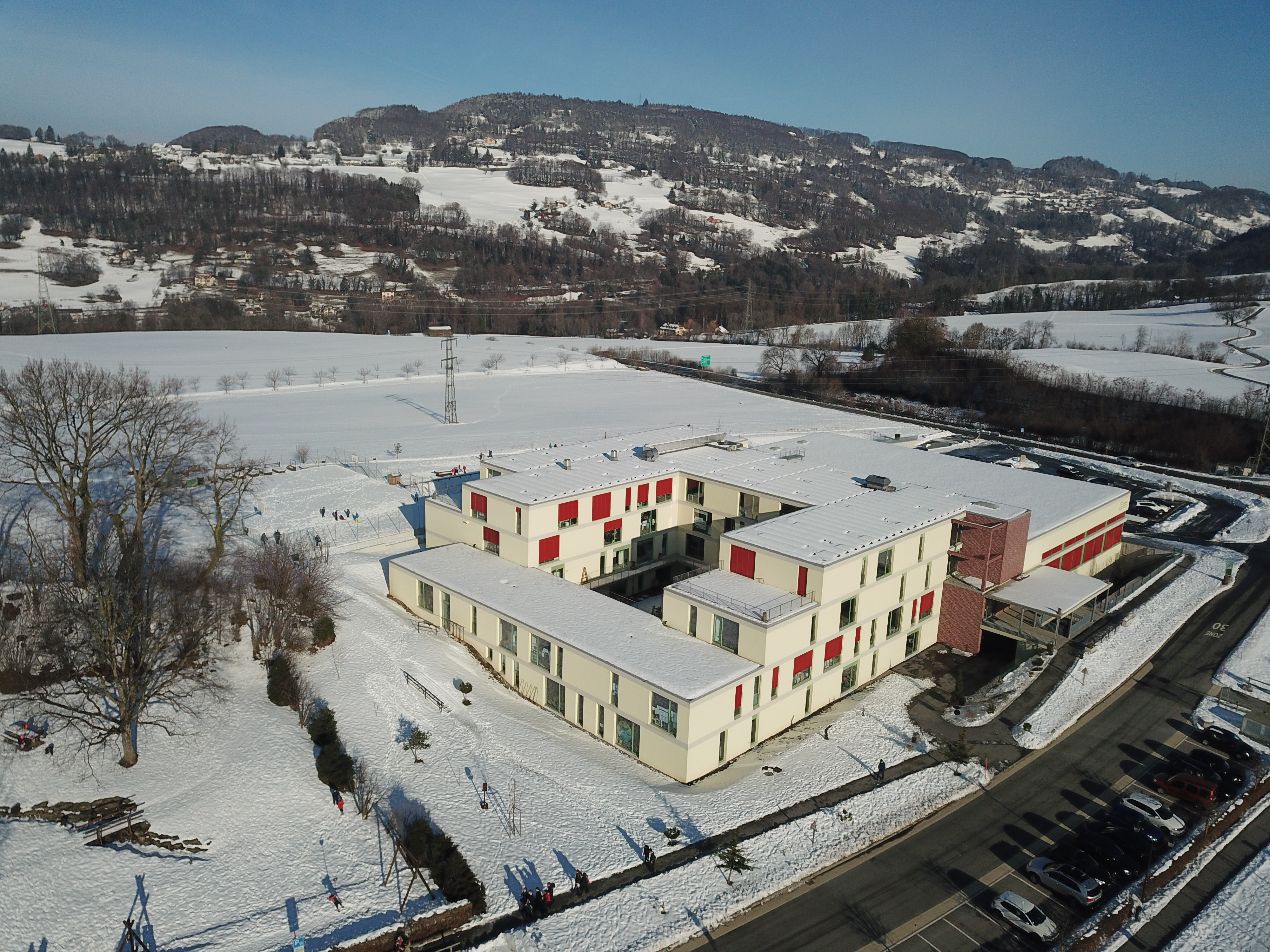 B^timent de l'école primaire